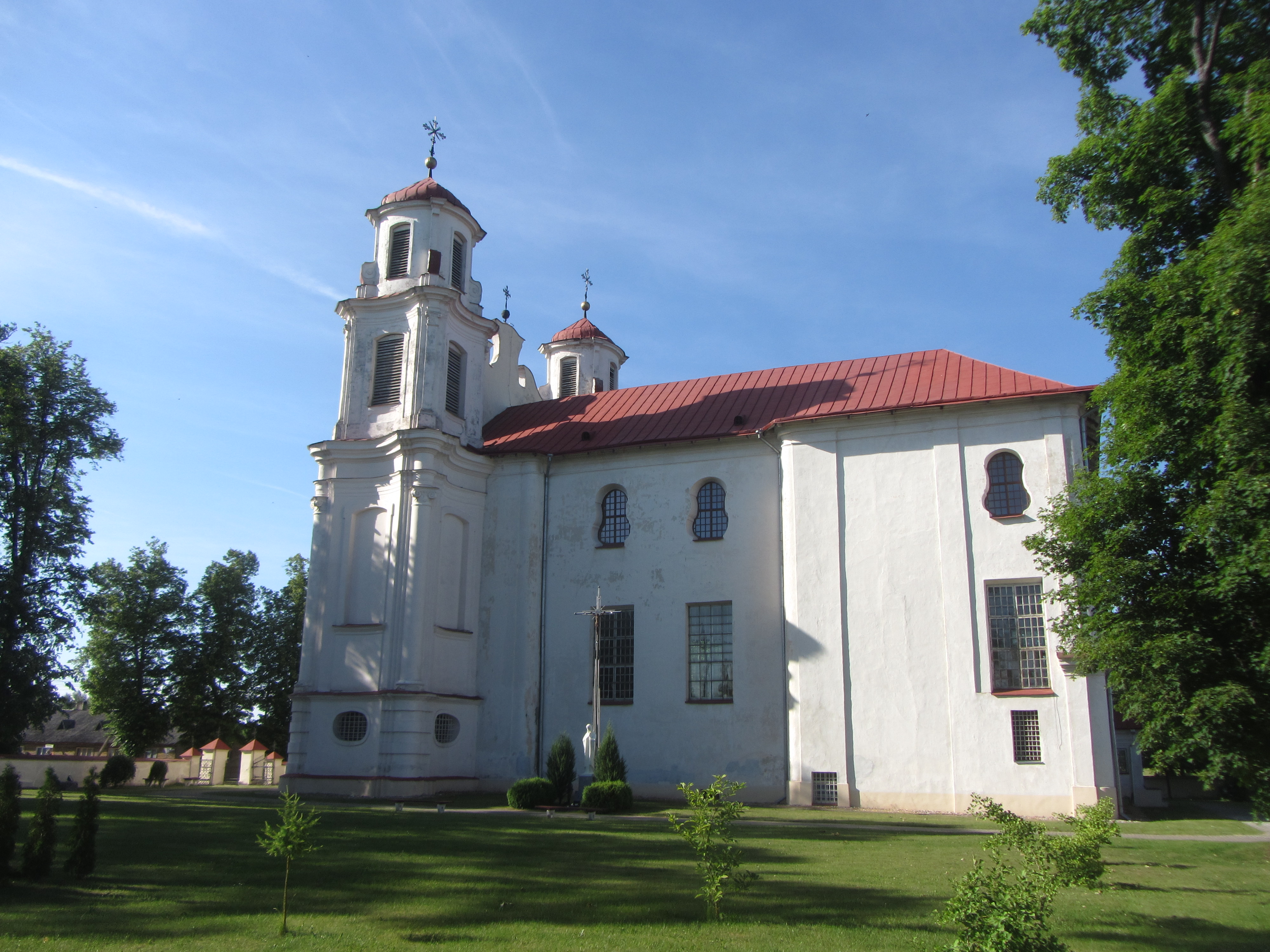 Jieznas, Lithuania